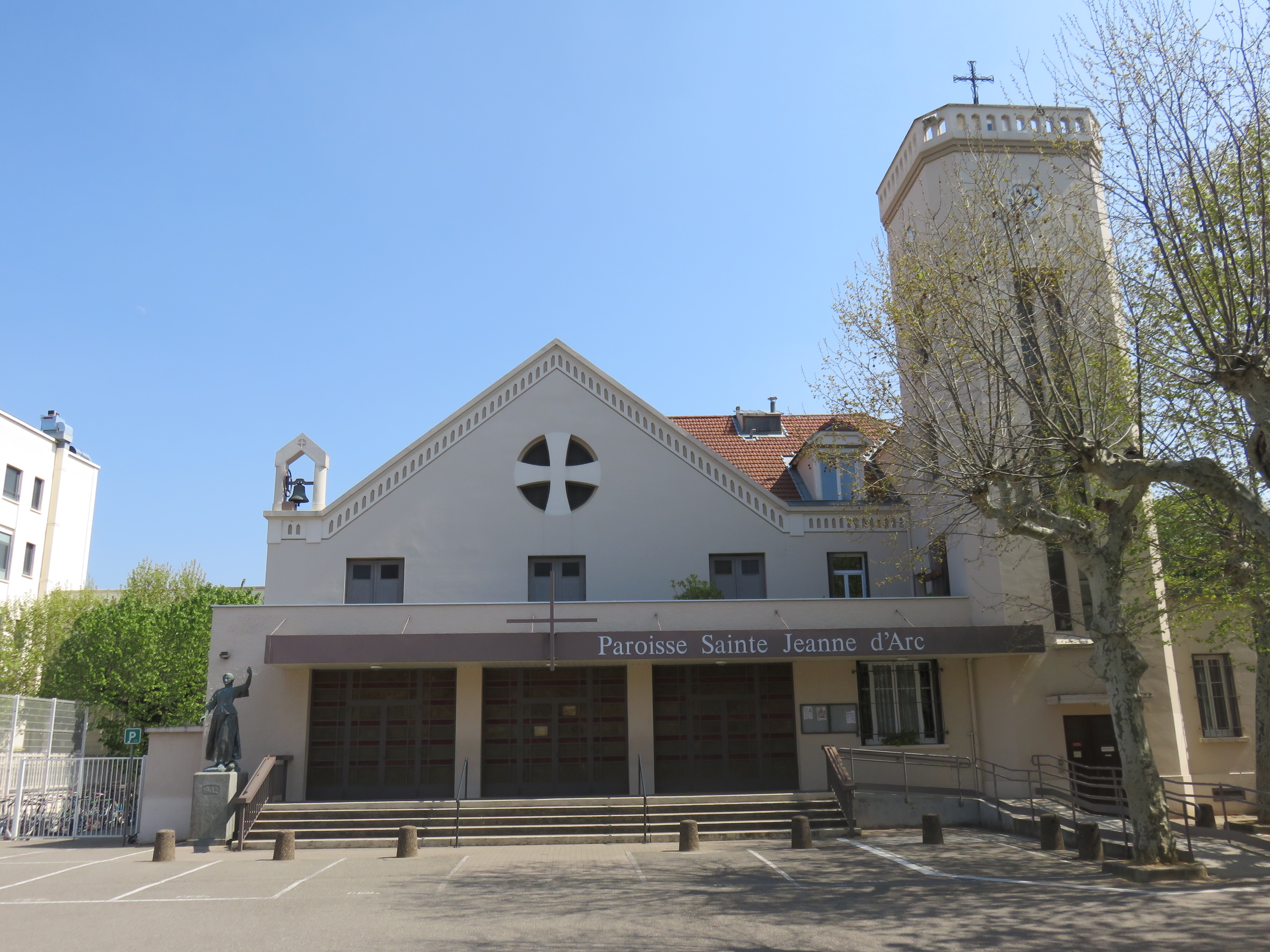 Vue de face de l'église Sainte Jeanne d'Arc de Lyon, dans le 3e arrondissement.